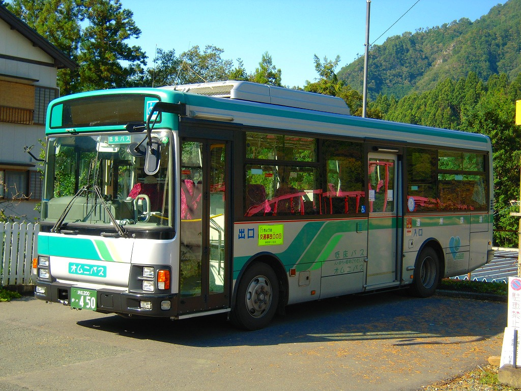 遠州鉄道バス いすゞ・エルガミオ（ワンステップバス） Entetsu bus Isuzu Erga Mio(onestep bus)